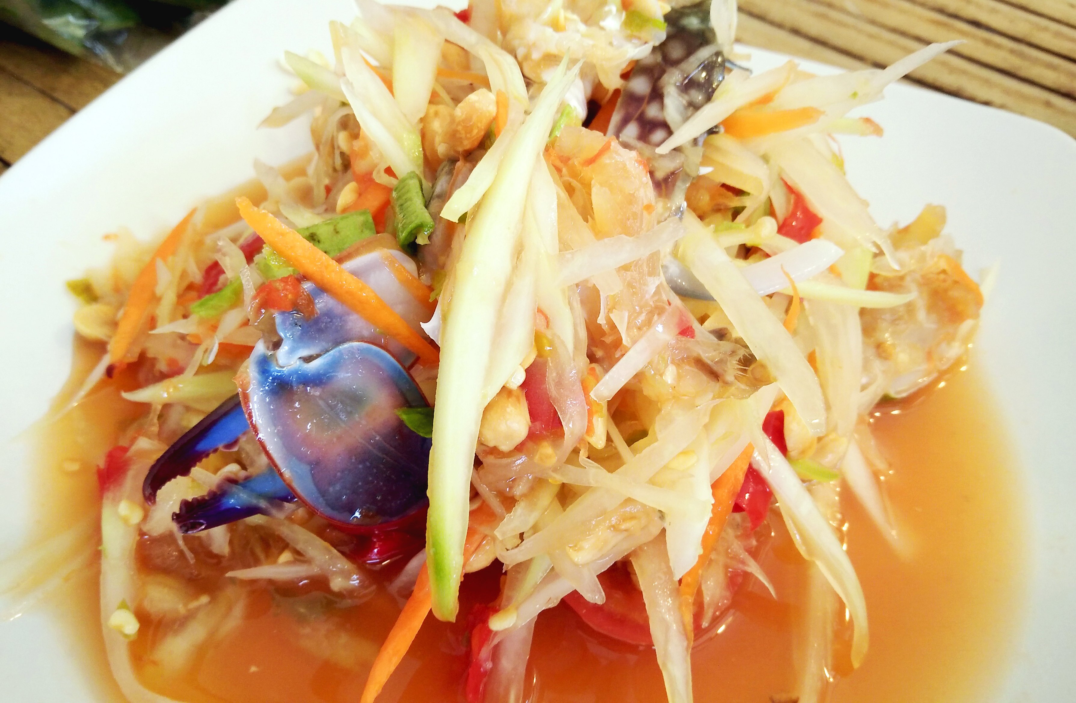 ส้มตำ ตำถาด